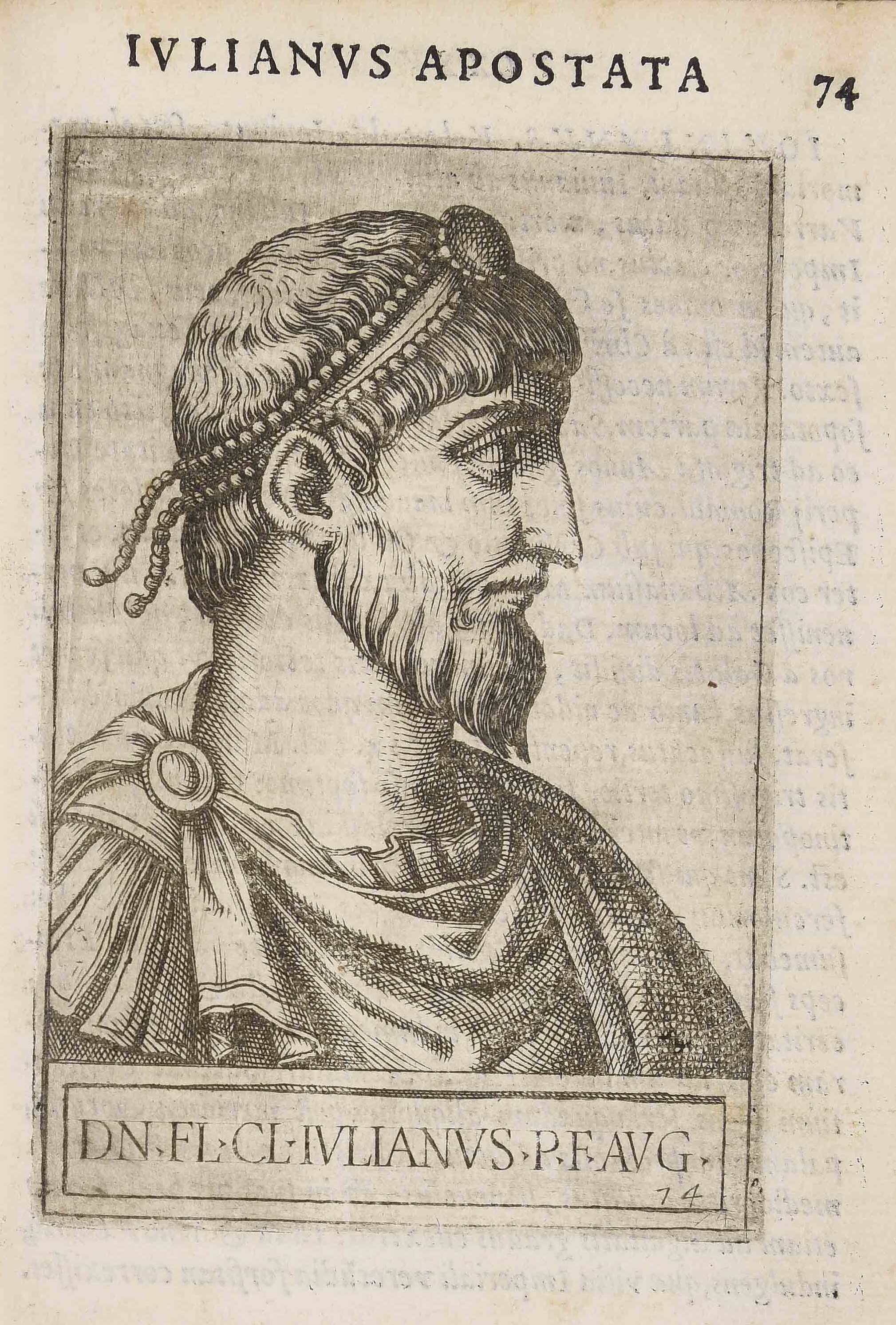 Calcografia in Giovanni Battista Cavalieri & Thomas Treterus, Romanorum imperatorum effigies, Roma, Vincenzo Accolti, 1583.